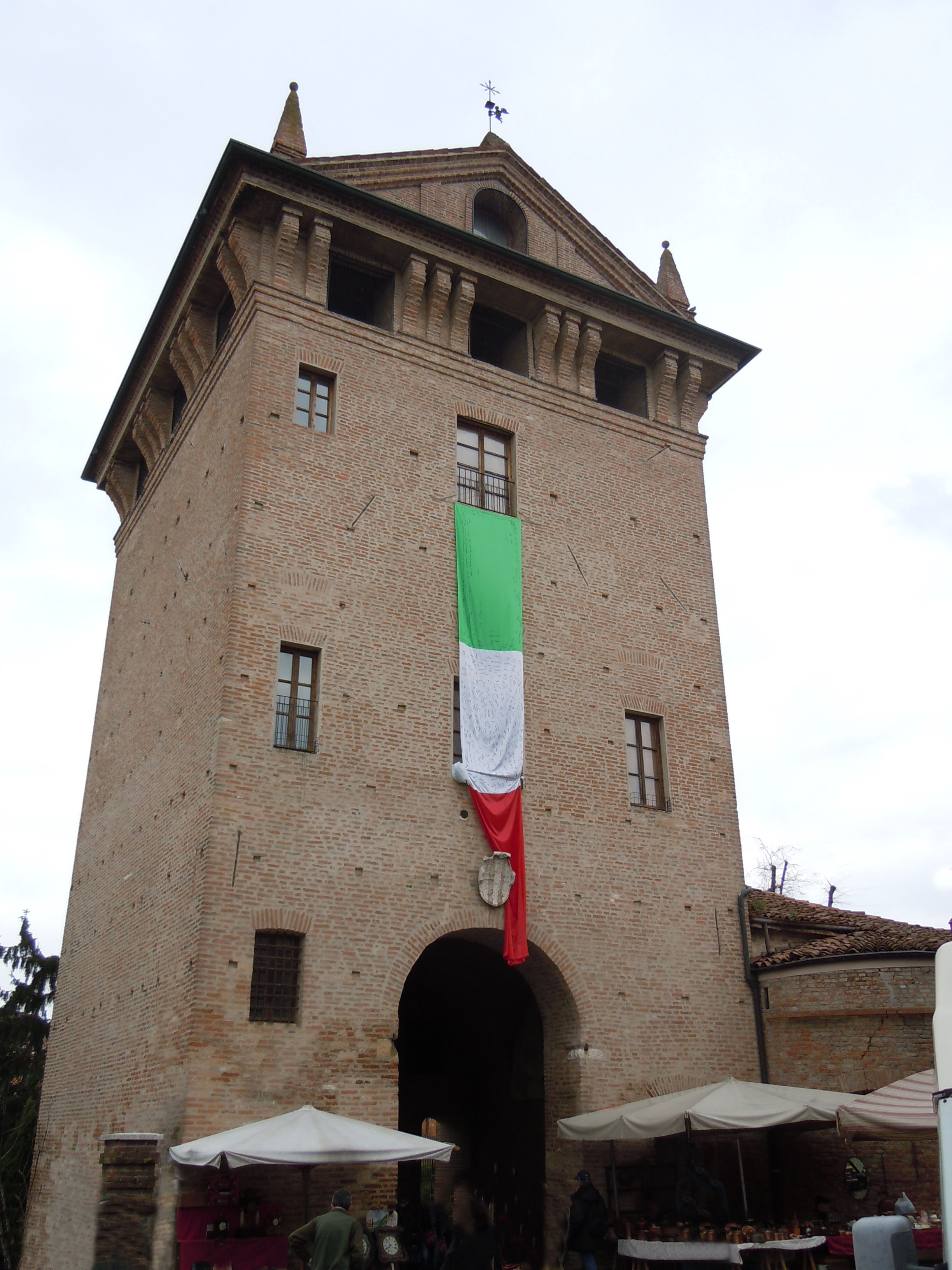 Gonzaga, torre quattrocentesca dell'ex castello.